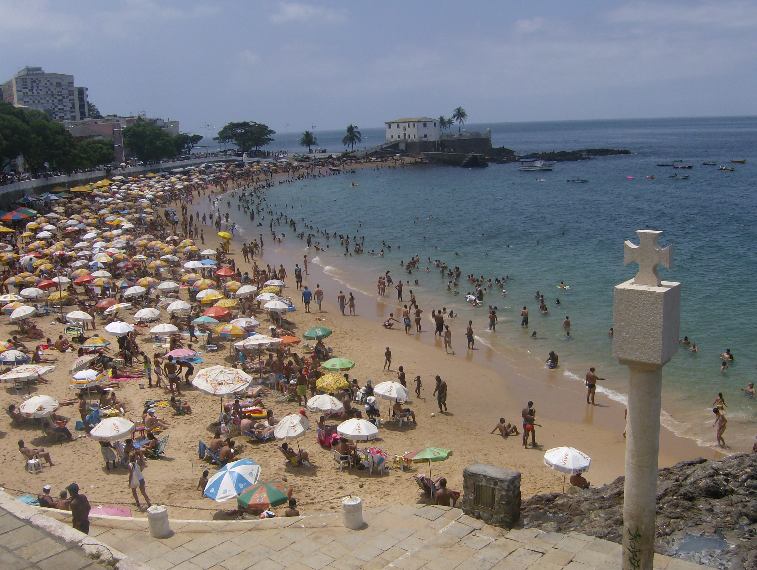 A Praia do Porto da Barra, Salvador, Bahia, Brasil.